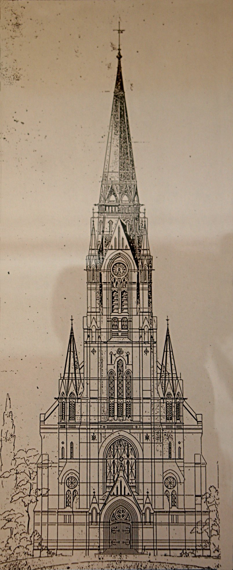 Johanneskirken i Bergen, 1888–1894 tegnet av arkitekt Herman Major Backer (1856-1932)